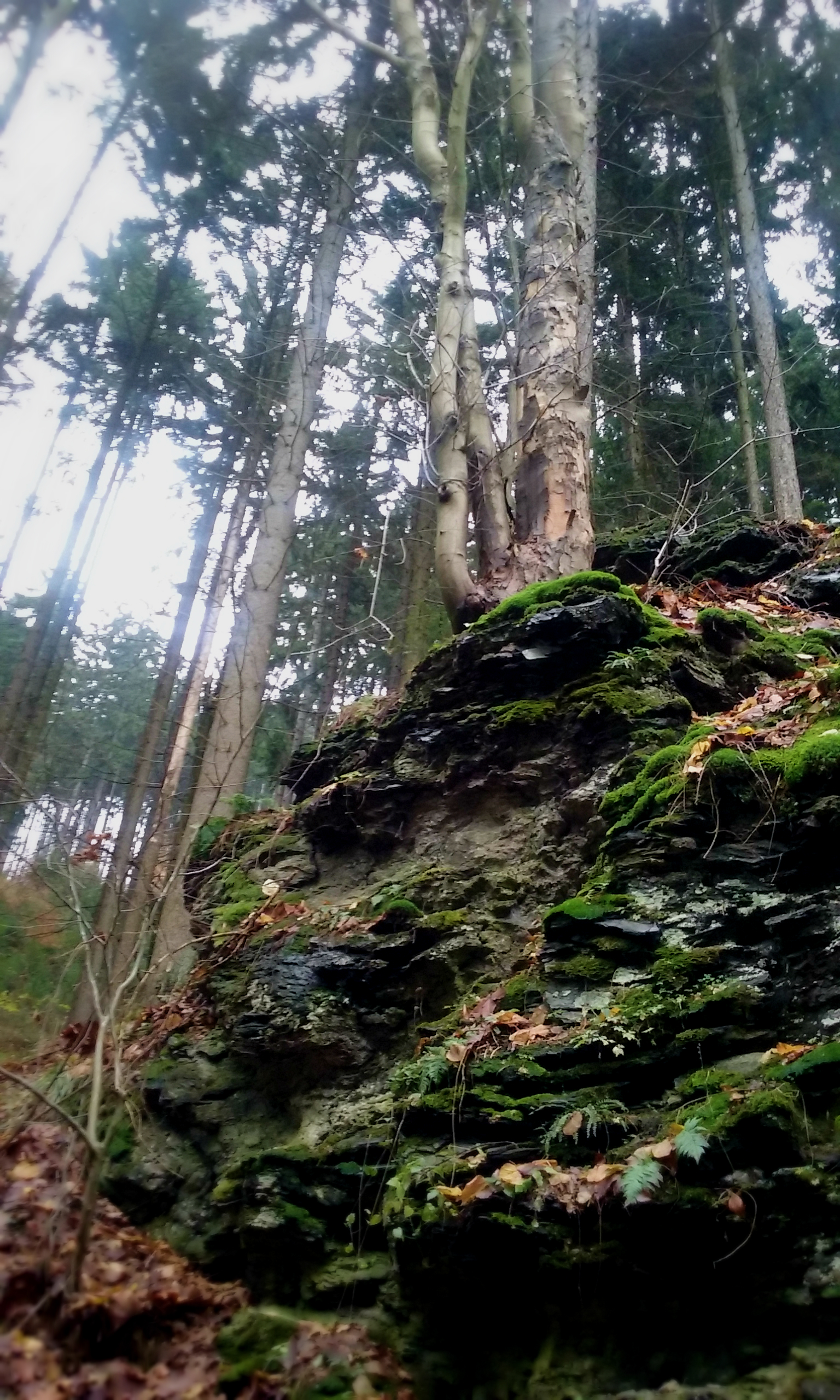 Skalní útvary s vegetací